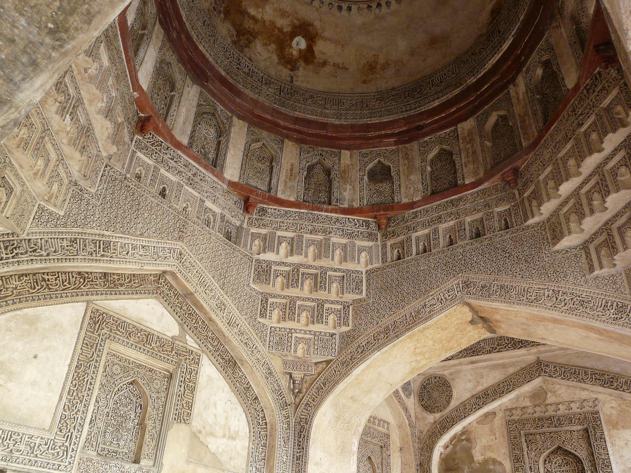 Bada Gumbad mosque central dome Bara Gumbad, Lodhi Garden, Delhi